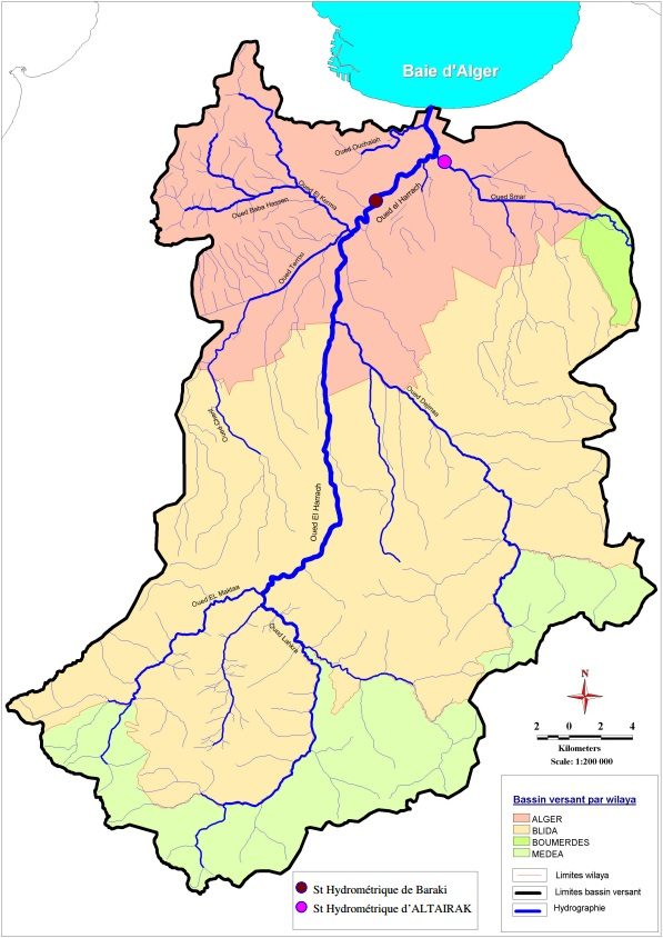 Bassin versant de Oued El Harrach